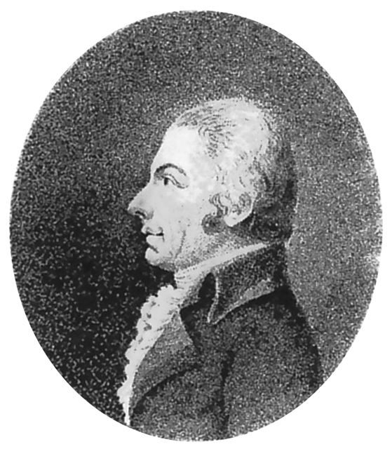 Franz Anton de Paula Gaheis (1739-1809), Bildarchiv der Österreichische Nationalbibliothek